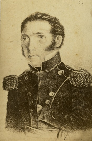 Reproducción fotográfica de un retrato pictórico de medio cuerpo que muestra al militar, periodista, político y gobernador de la provincia de Buenos Aires con uniforme militar y una mano en la chaqueta al estilo de Napoleón Bonaparte.